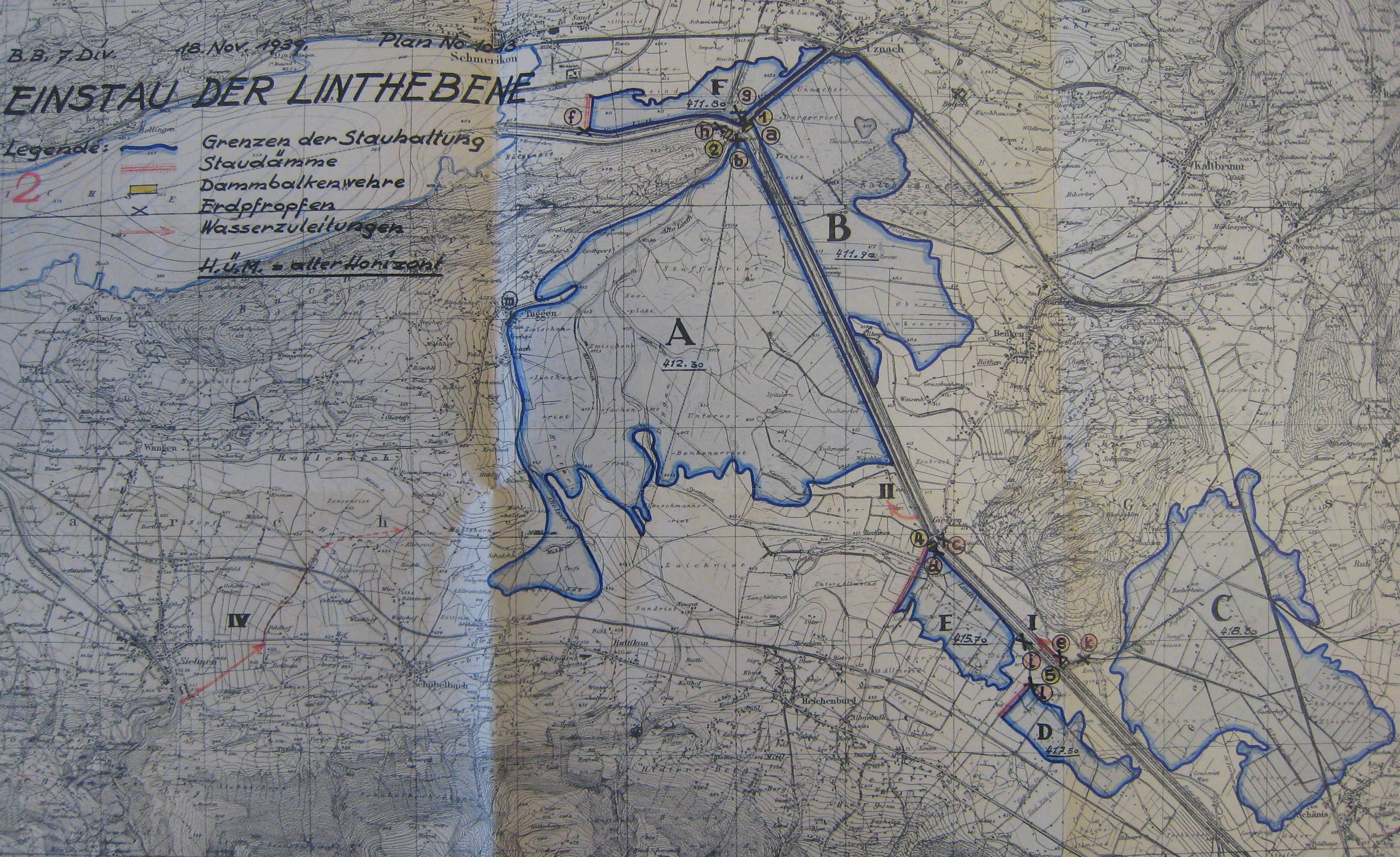 Einstau der Linthebene, Plan vom 18. November 1939, Baubüro der 7. Division